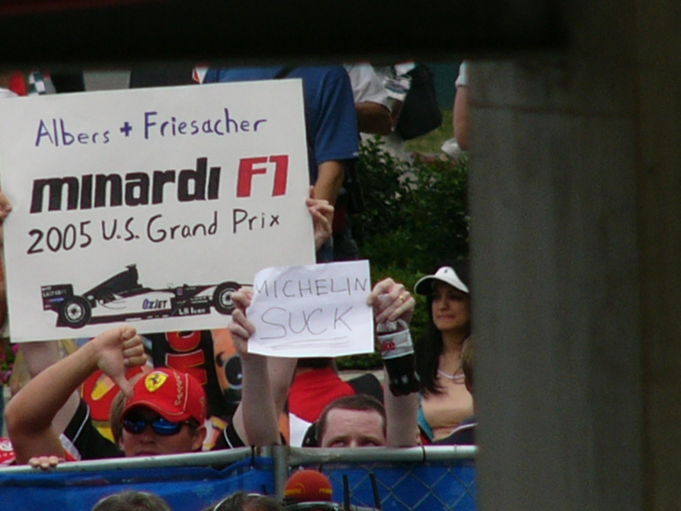 サイテー。 そんなところですね。